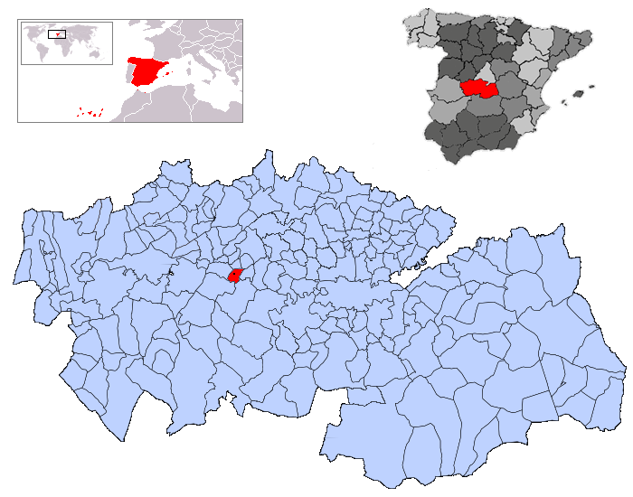 Mesegar de Tajo en la provincia de Toledo